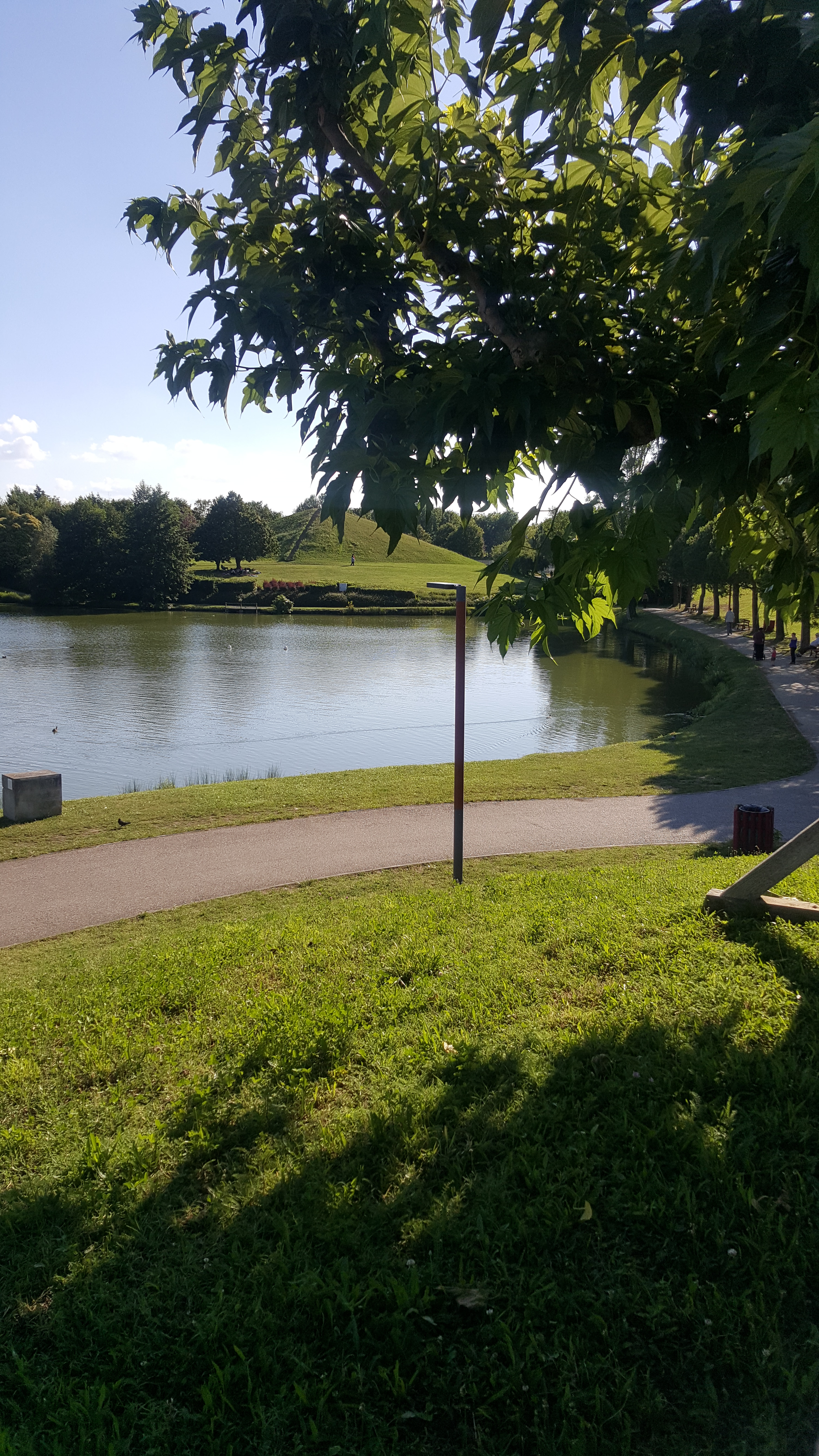 belle nature